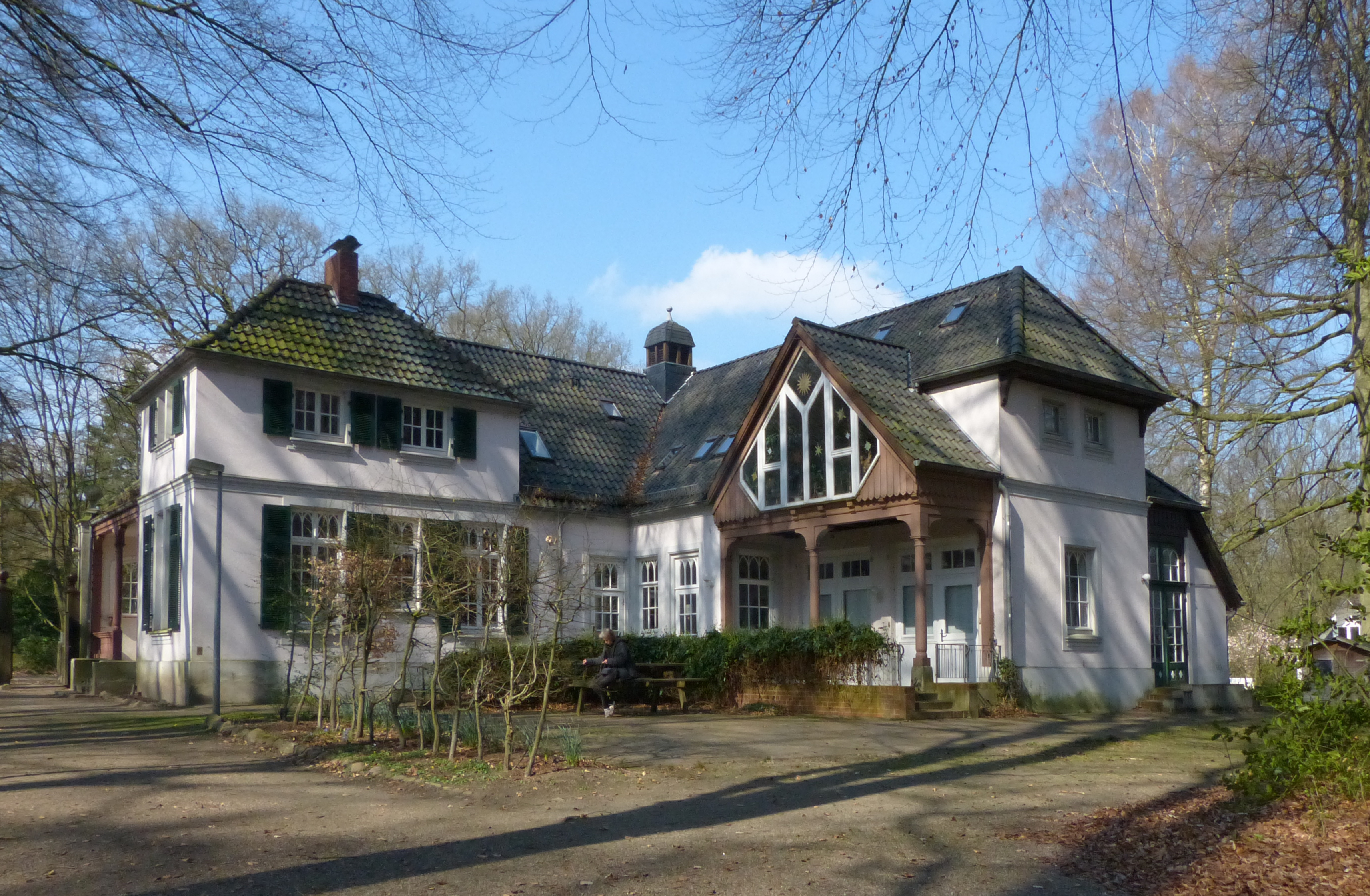 Landhaus Lamotte, Hofmeierhaus, Ökologiestation in Bremen, Am Gütpohl 11Das abgebildete Objekt ist ein geschütztes Kulturdenkmal in der Freien Hansestadt Bremen, mit der Nr. 1654 beim Landesamt für Denkmalpflege registriert.